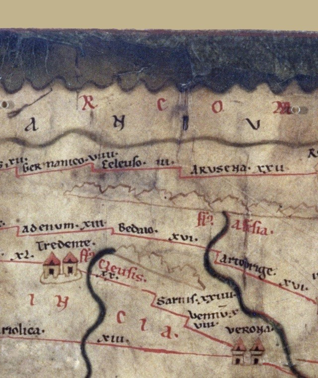 Tabula Peutingeriana